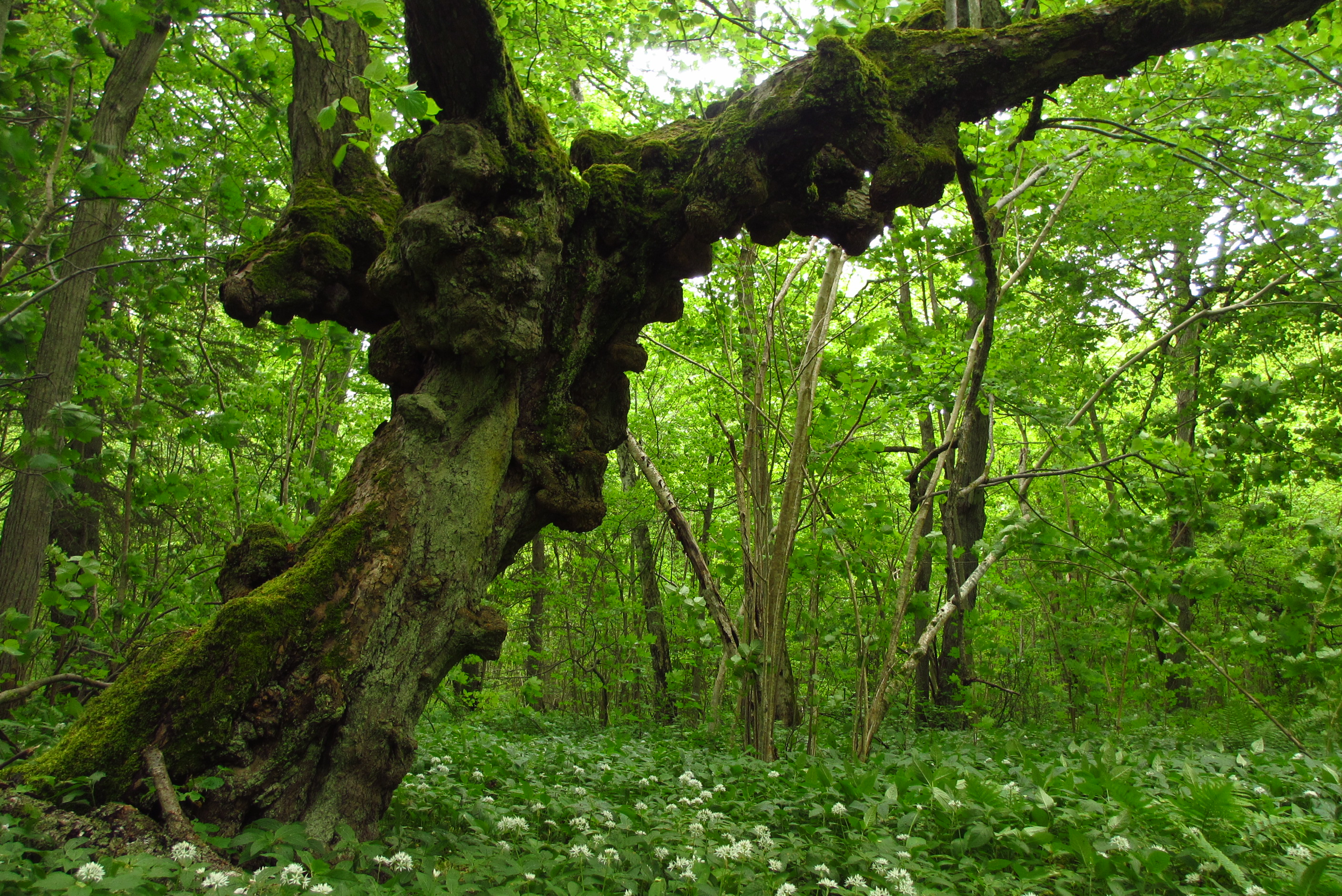 Lippmaa pärn Abruka saarel